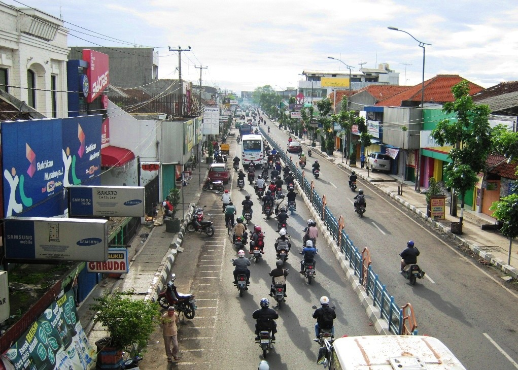 Alun-alun Cimahi